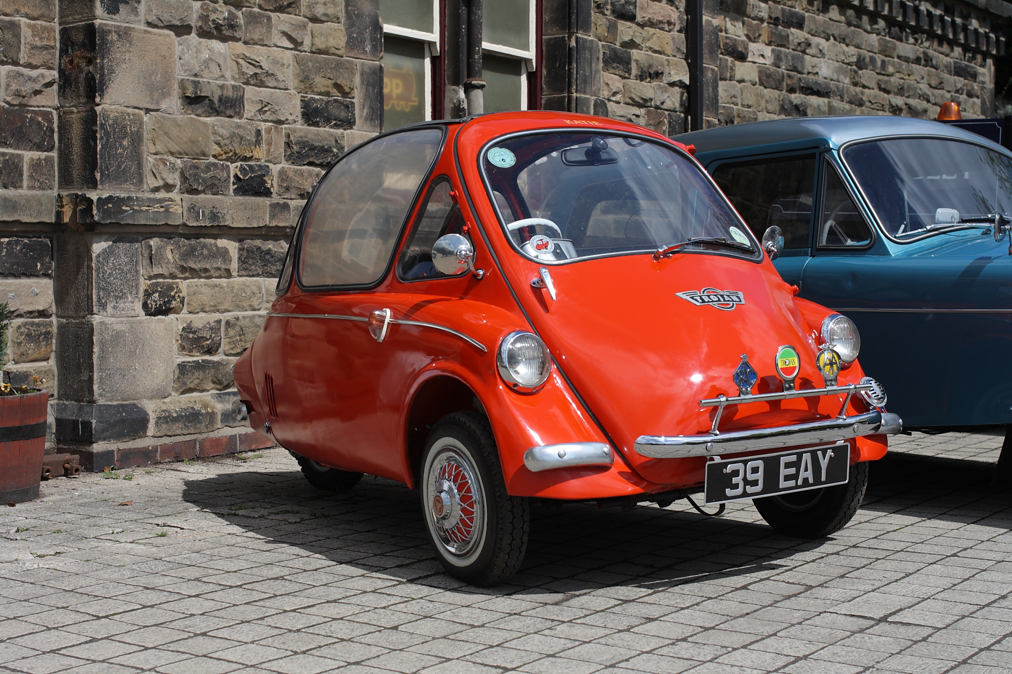 Trojan